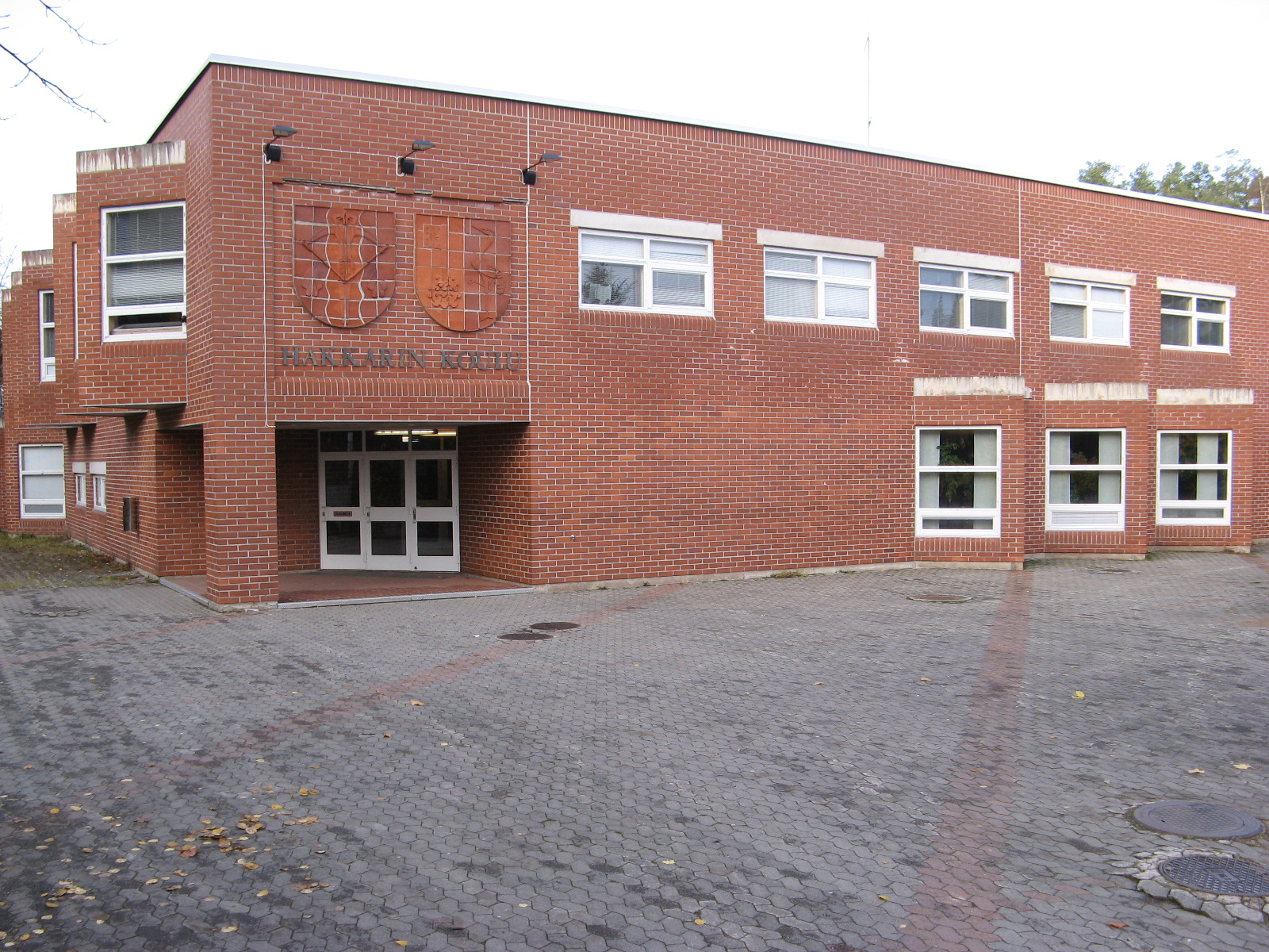 Hakkarin koulu